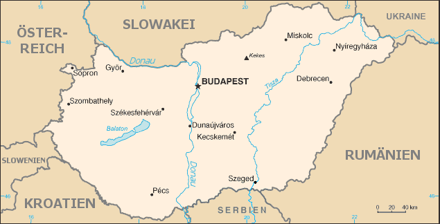 Karte Ungarn